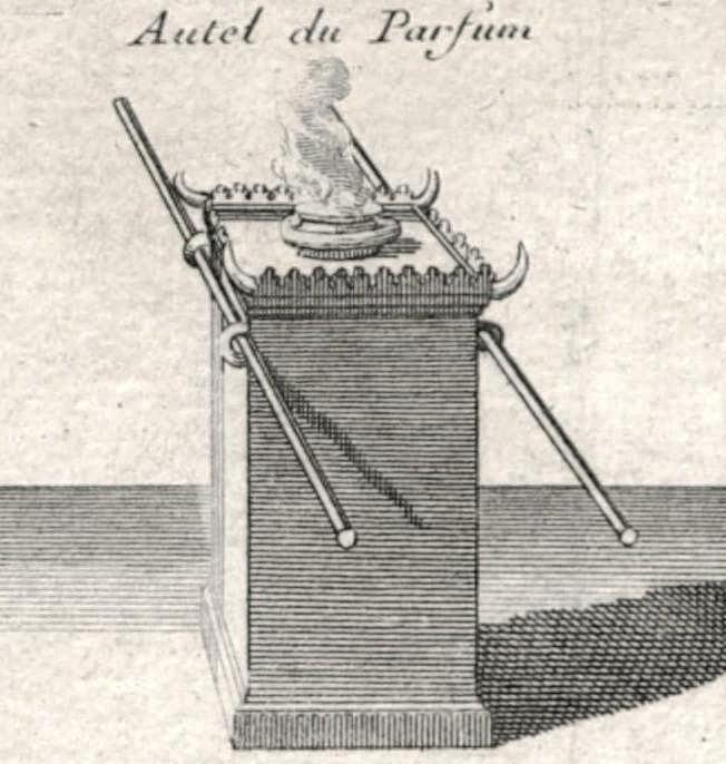 Autel du Parfum. From: Carte du voïage des Israëlites dans le désert depuis leur sortie de l'Egipte jusqu'au passage du Jourdain, dressé par l'auteur du commentaire de l'Exode et / exécutée par Liébaux, géografe.